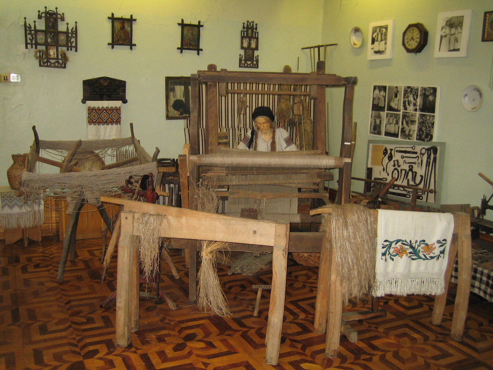 Ткацький верстат. Історико-краєзнавчий музей культури та побуту Бойківщини (Цінева)